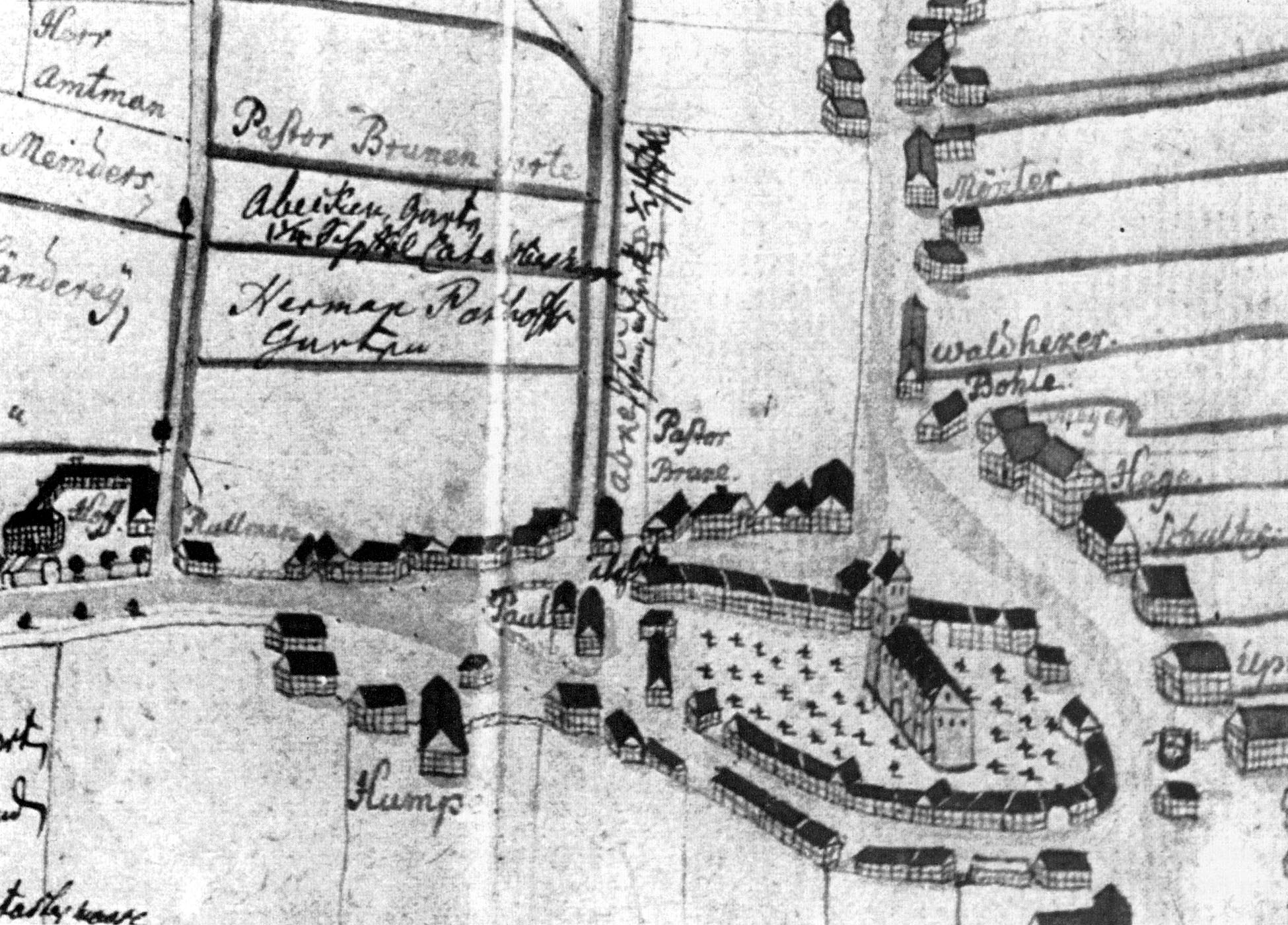 Der erste Stadtlpan von Halle (Westf.), 1784